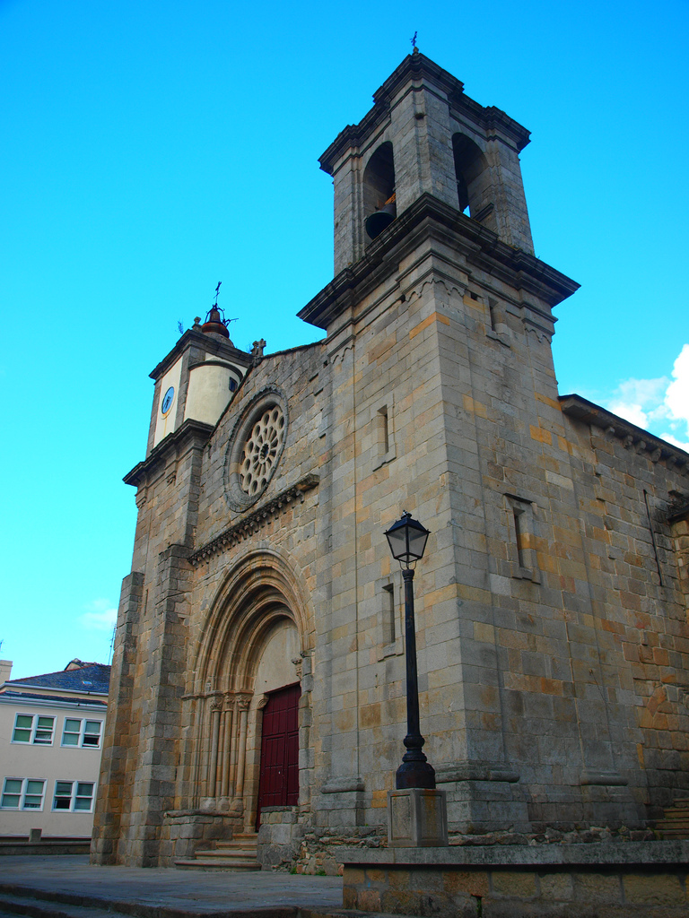 Iglesia de Santa Maria del Campo. Viveiro